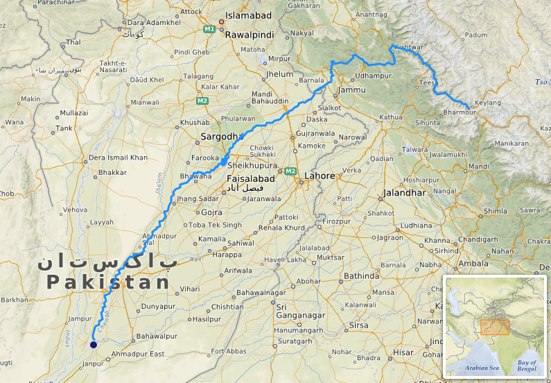 carte réalisée sur umap, [1] This map may be incomplete, and may contain errors. Don't rely solely on it for navigation.